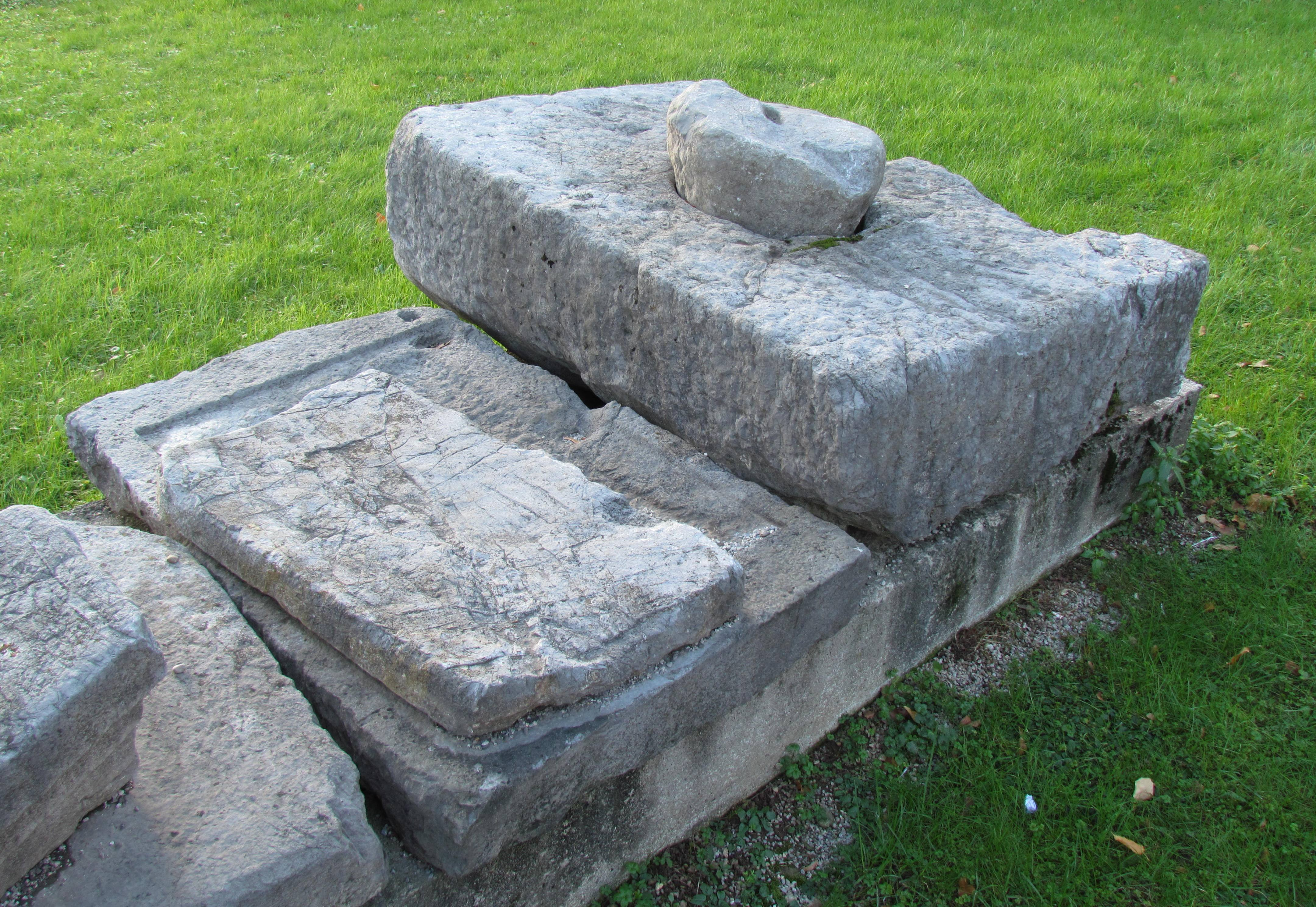 Pokrov emonske kloake s kamnitim čepom pred Gimnazijo Antona Aškerca na Aškerčevi cesti v Ljubljani.